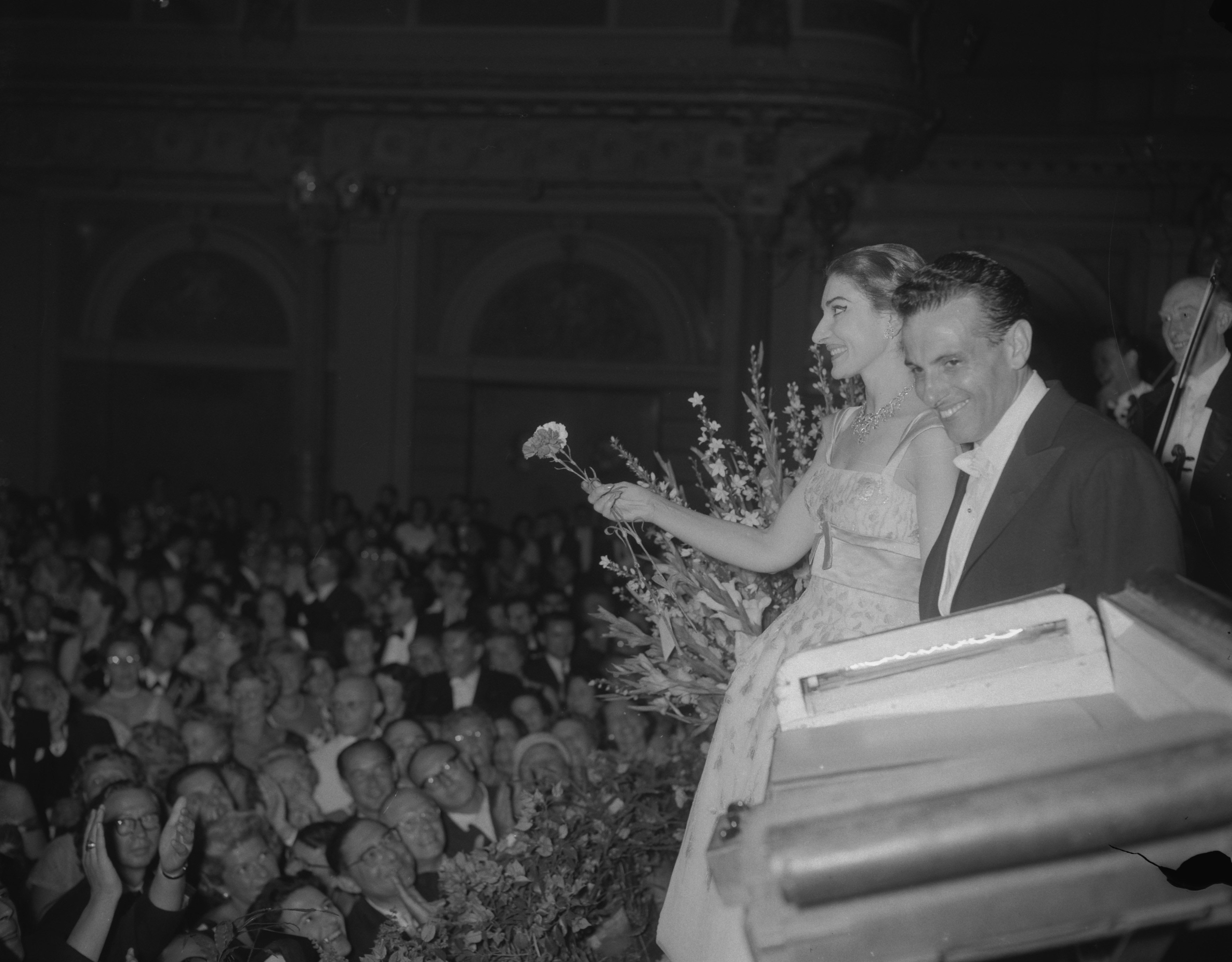 Collectie / Archief : Fotocollectie Anefo Reportage / Serie : [ onbekend ] Beschrijving : Concert van Maria Callas in het Concertgebouw te Amsterdam, Maria Callas bedankt voor het applaus Datum : 11 juli 1959 Fotograaf : Bilsen, Joop van / Anefo Auteursrechthebbende : Nationaal Archief Materiaalsoort : Negatief (zwart/wit) Nummer archiefinventaris : bekijk toegang 2.24.01.04 Bestanddeelnummer : 910-5170